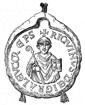 Richwin de Commercy, évêque de Toul